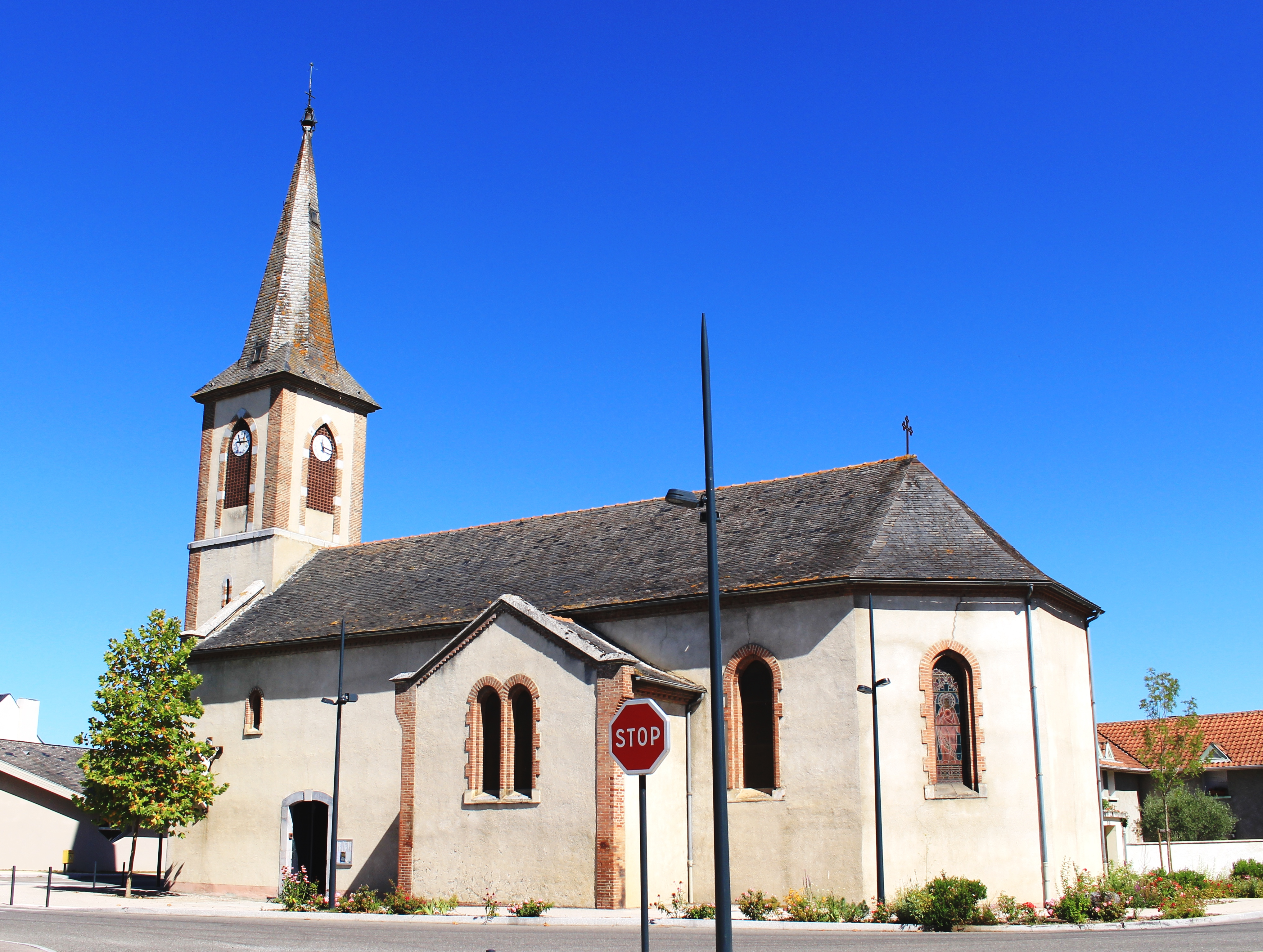 Église de l’Assomption de Bours (Hautes-Pyrénées)